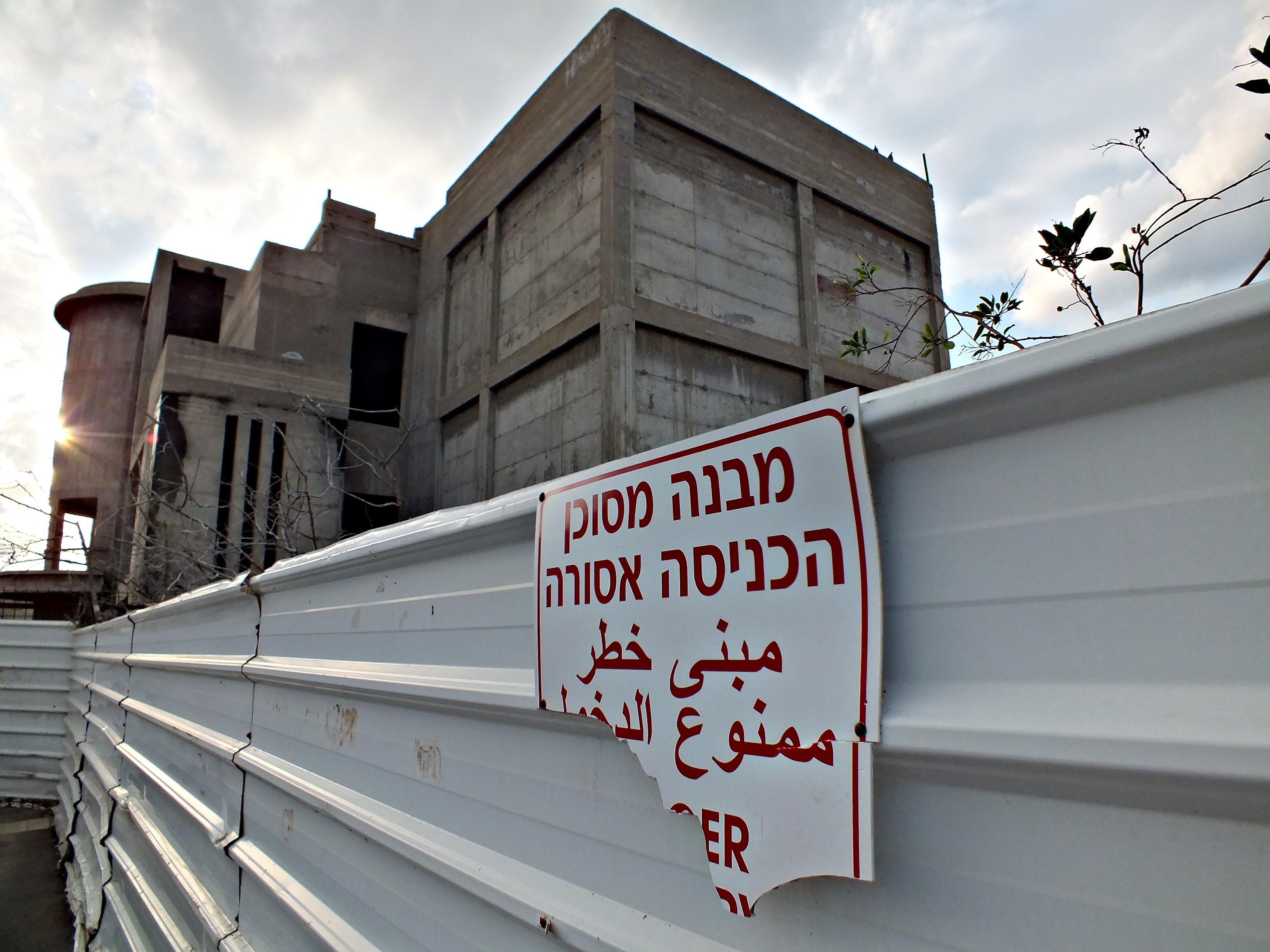 קזינו בת גלים היה מבנה בשכונת בת גלים בחיפה ששימש לפעילויות קהילה ופנאי משנות ה-30 של המאה ה-20, אך נהרס לאחר שנים, וכיום ניצב במקומו שלד בטון. חרף שמו, לא שימש המקום מעולם כקזינו.